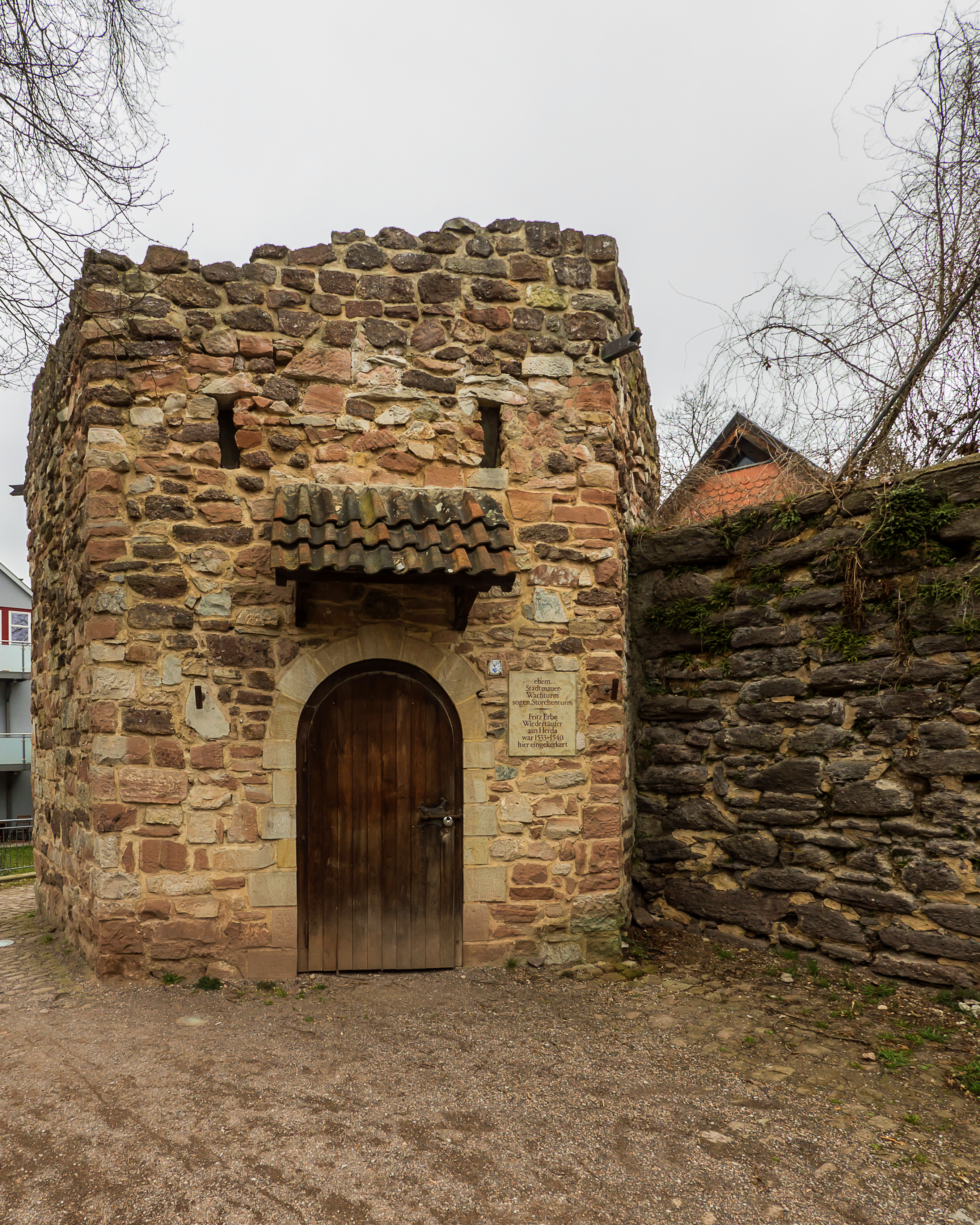 Eisenach Schloßberg Alter Friedhof Stadtbefestigung Storchenturm